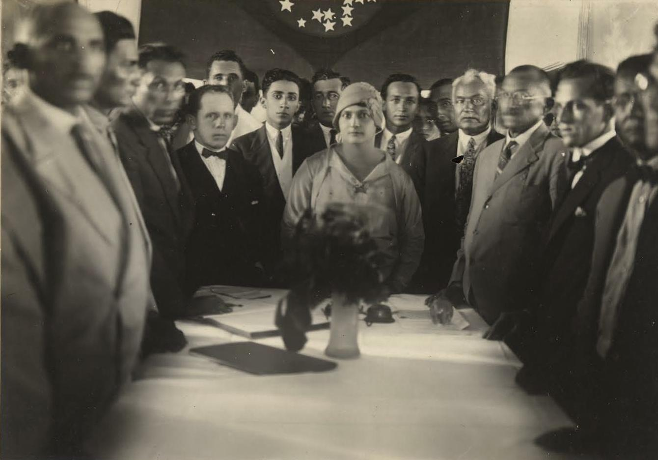 Posse da prefeita Luísa Alzira Soriano, Lajes, Rio Grande do Norte, 1º de janeiro de 1929. Arquivo Nacional, BR AN,RIO Q0.ADM, CPA.VFE, FOT.17